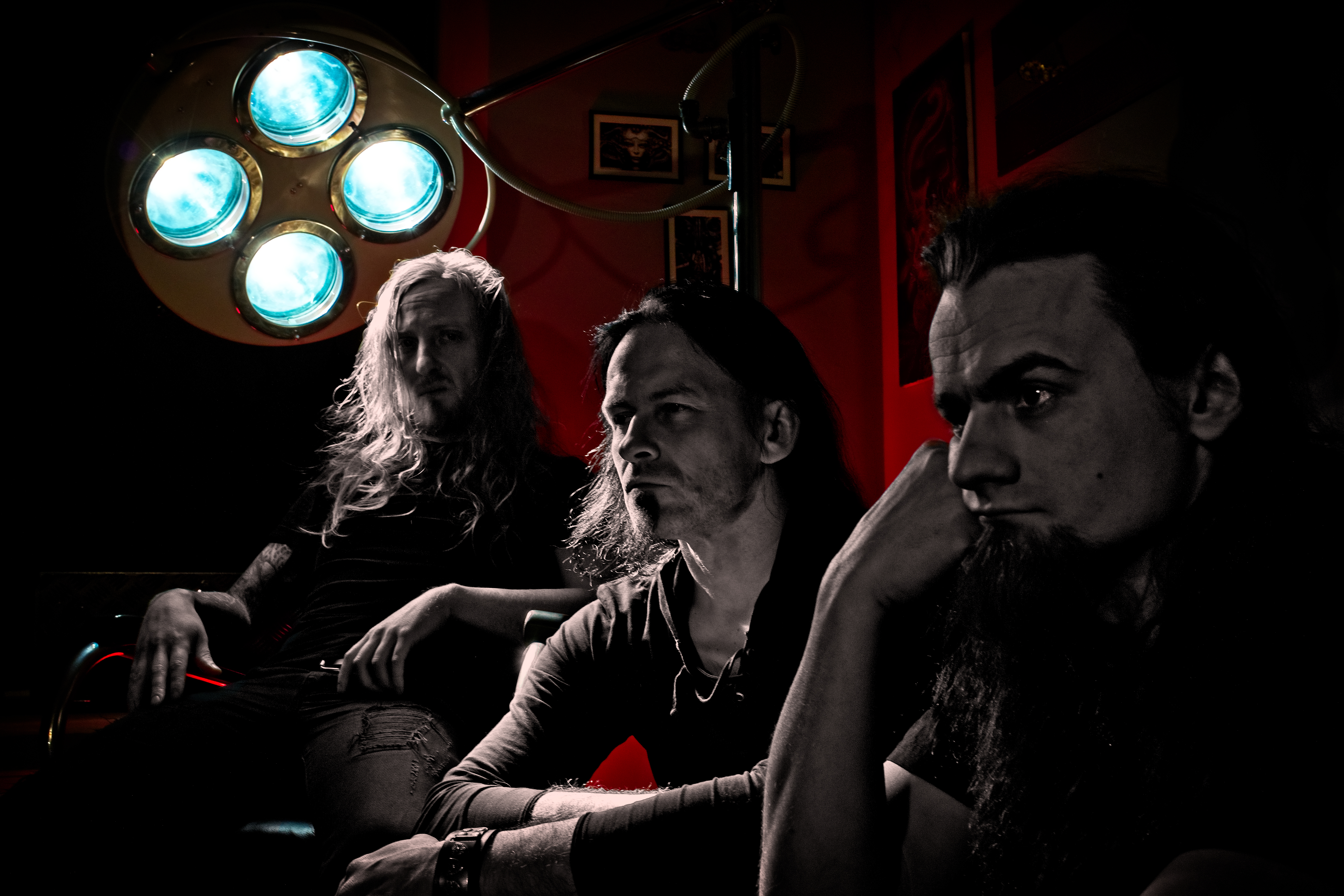 Grupa aPēdājs (no kreisās Artūrs Jakovļevs, Armands Butkevičs, Lauris Polinskis)